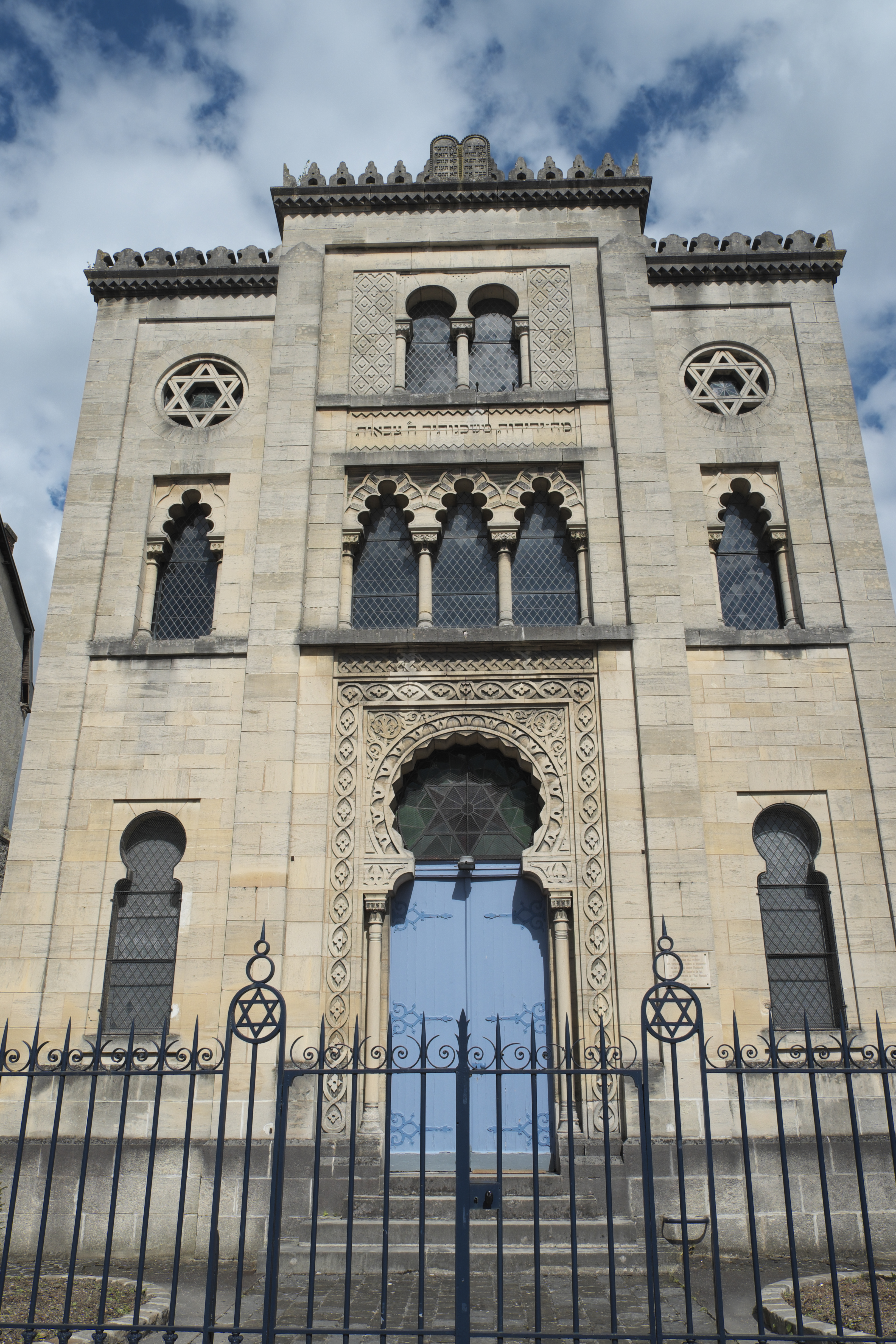 Synagoge in Châlons-en-Champagne im Département Marne (Champagne-Ardenne/Frankreich)